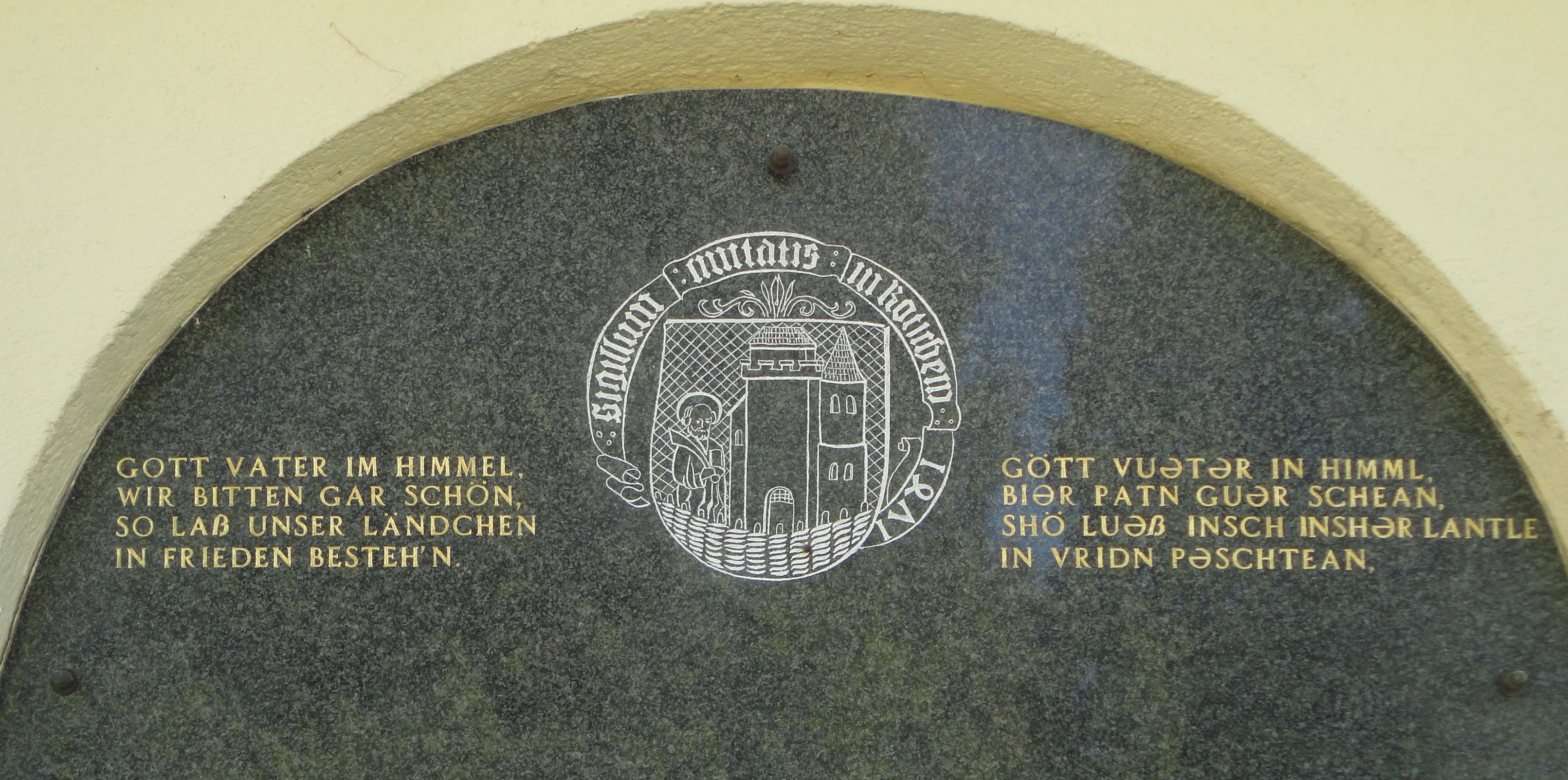 Napis v kočevarščini na spominski tabli na steni kapele Božjega Groba pri cerkvi Presvetega Rešnjega Telesa, Trata, Kočevje